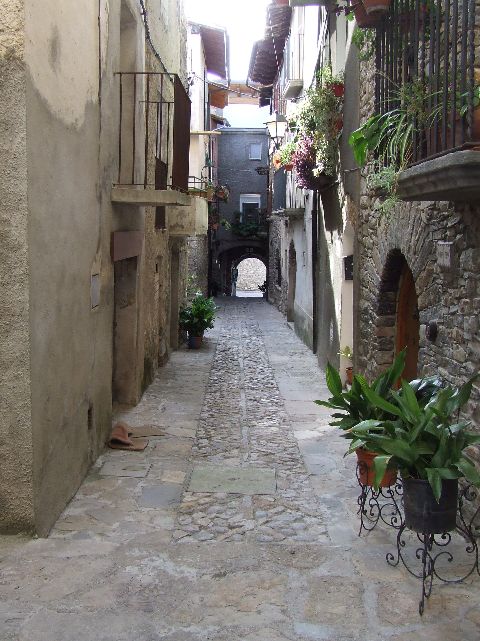 Carrer únic del poble clos de Sant Martí de Canals (Claverol, Conca de Dalt, Pallars Jussà)